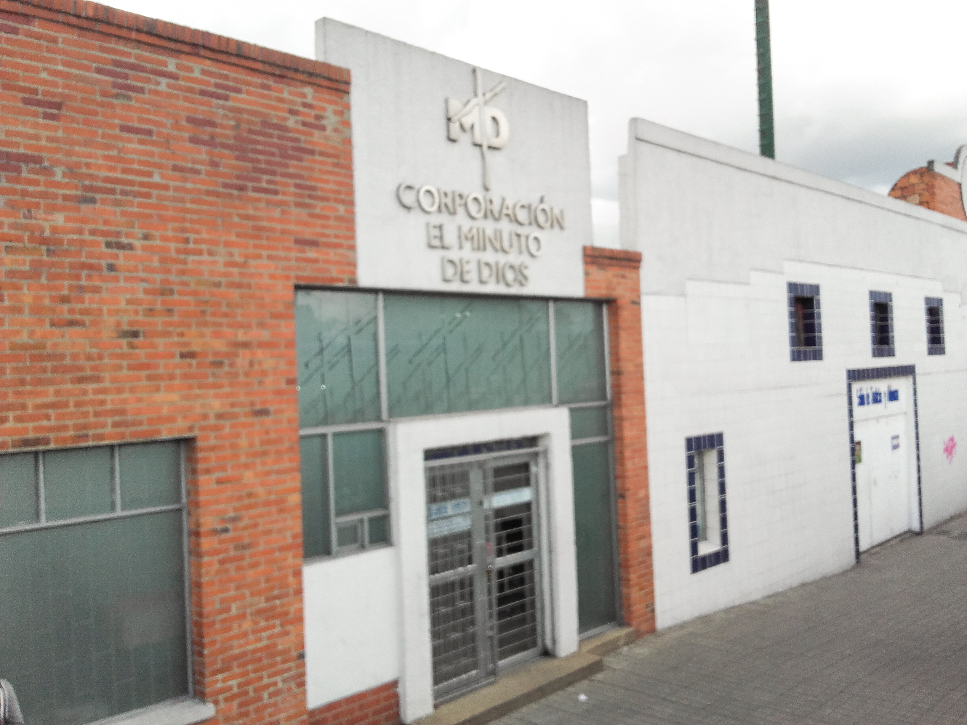 gngngnnnfxdnnzks